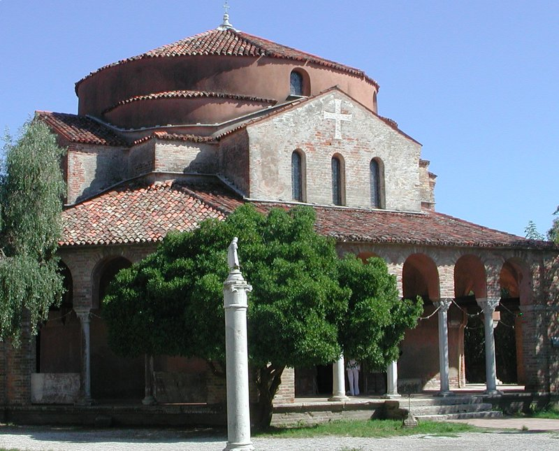 Chiesa di Santa Fosca a Torcello. Source: photo uploaded by User:RicciSpeziari. Photographer: Riccardo Speziari